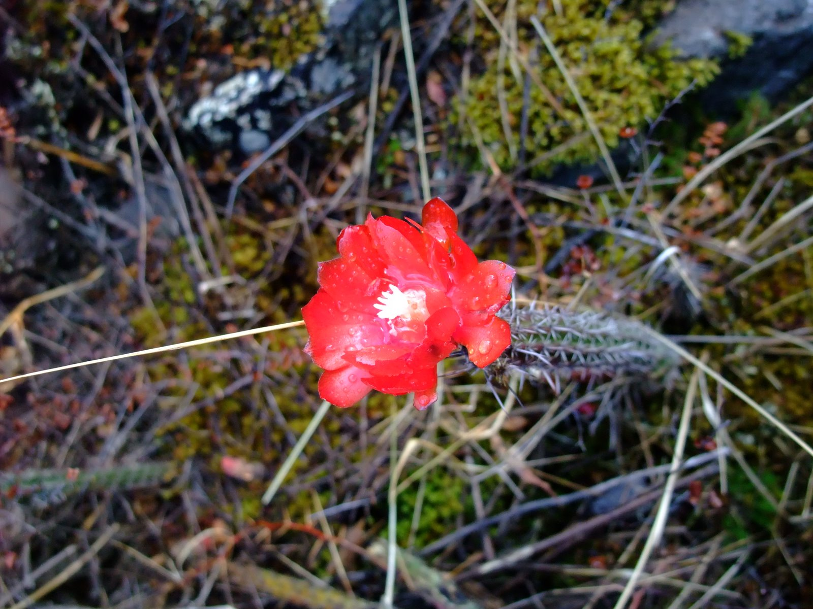 Erdisia